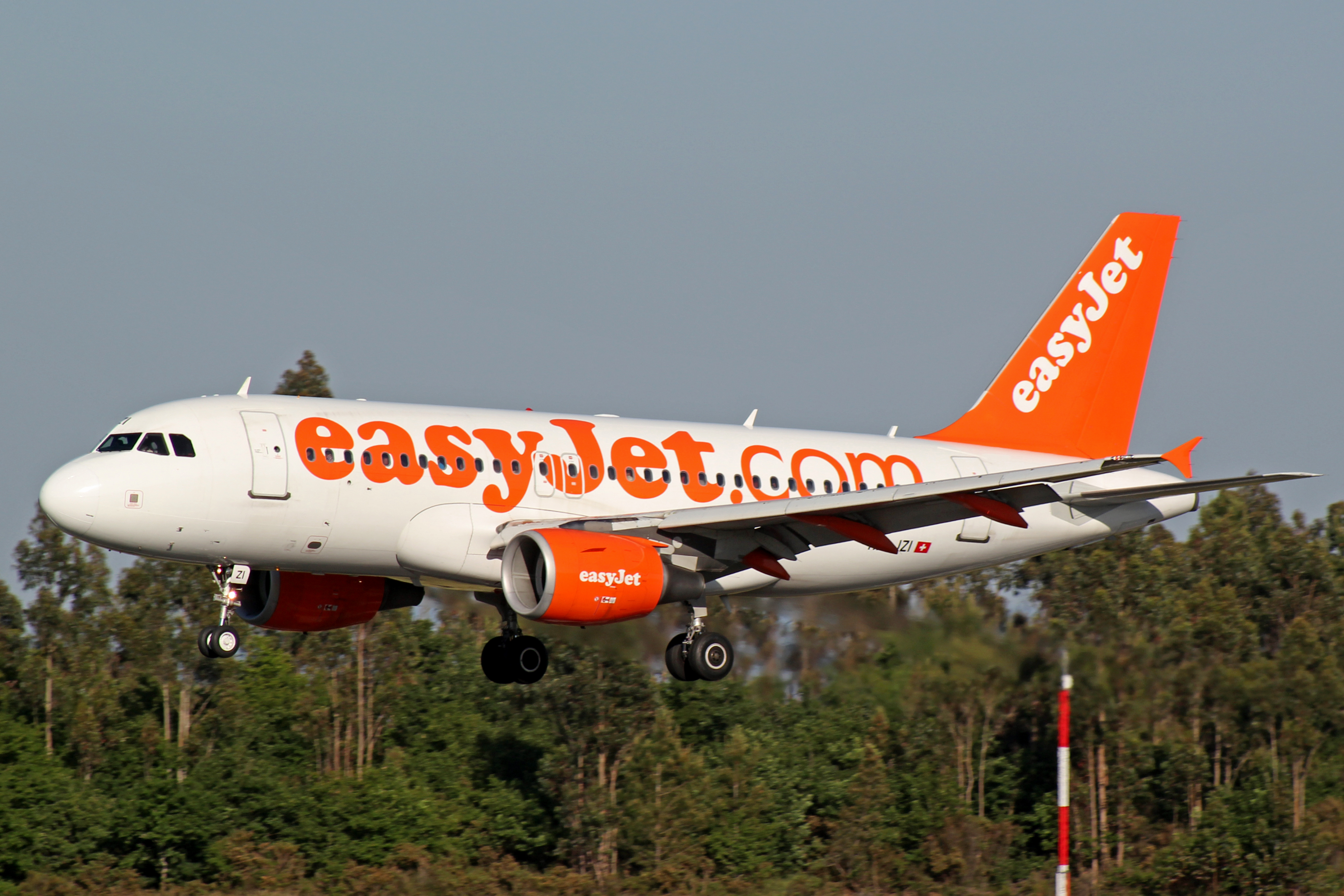 Airbus A319 de easyJet Switzerland no aeroporto de Santiago de Compostela.